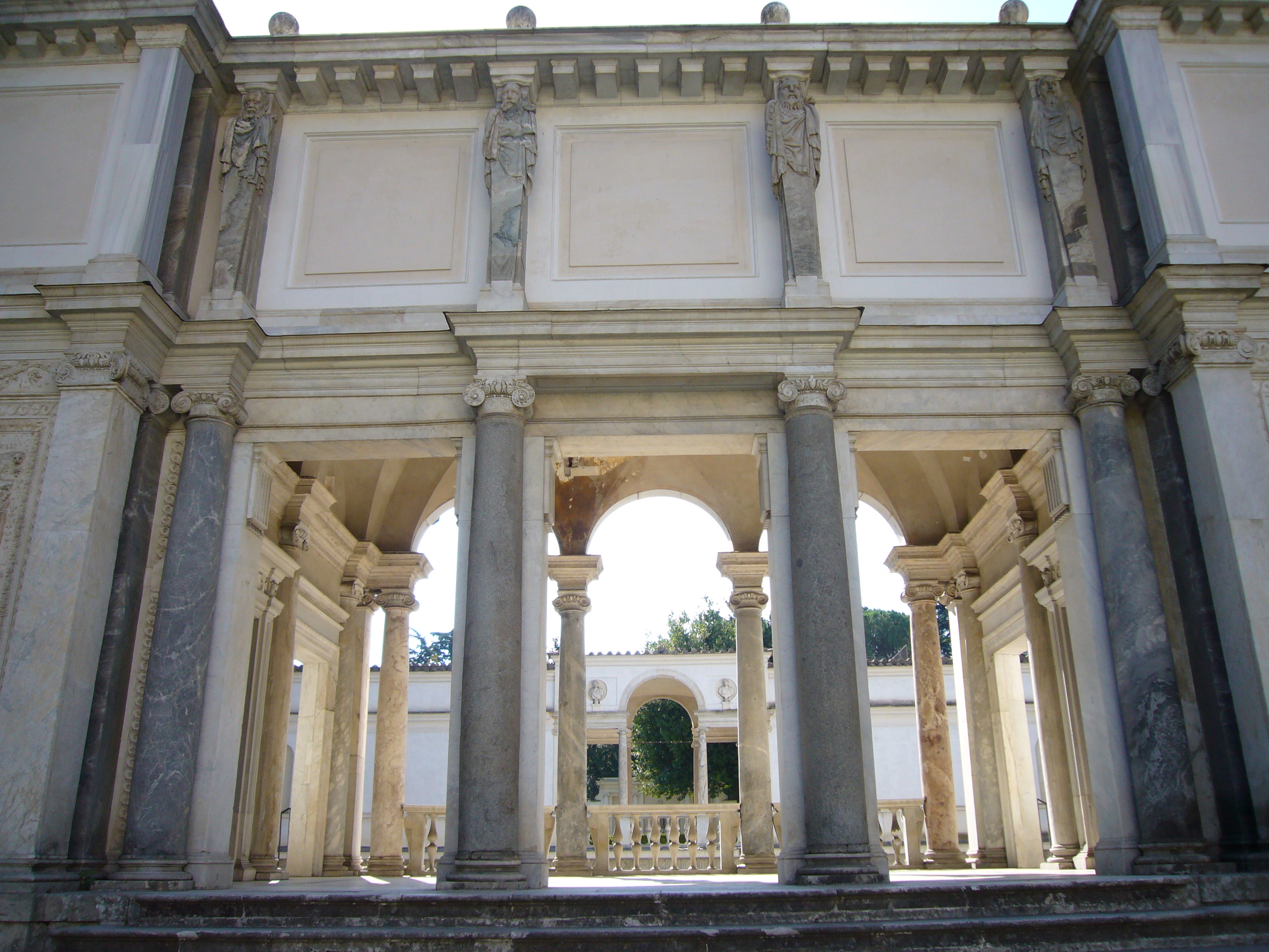 Roma, Villa Giulia: loggia dell'Ammannati dal primo cortile